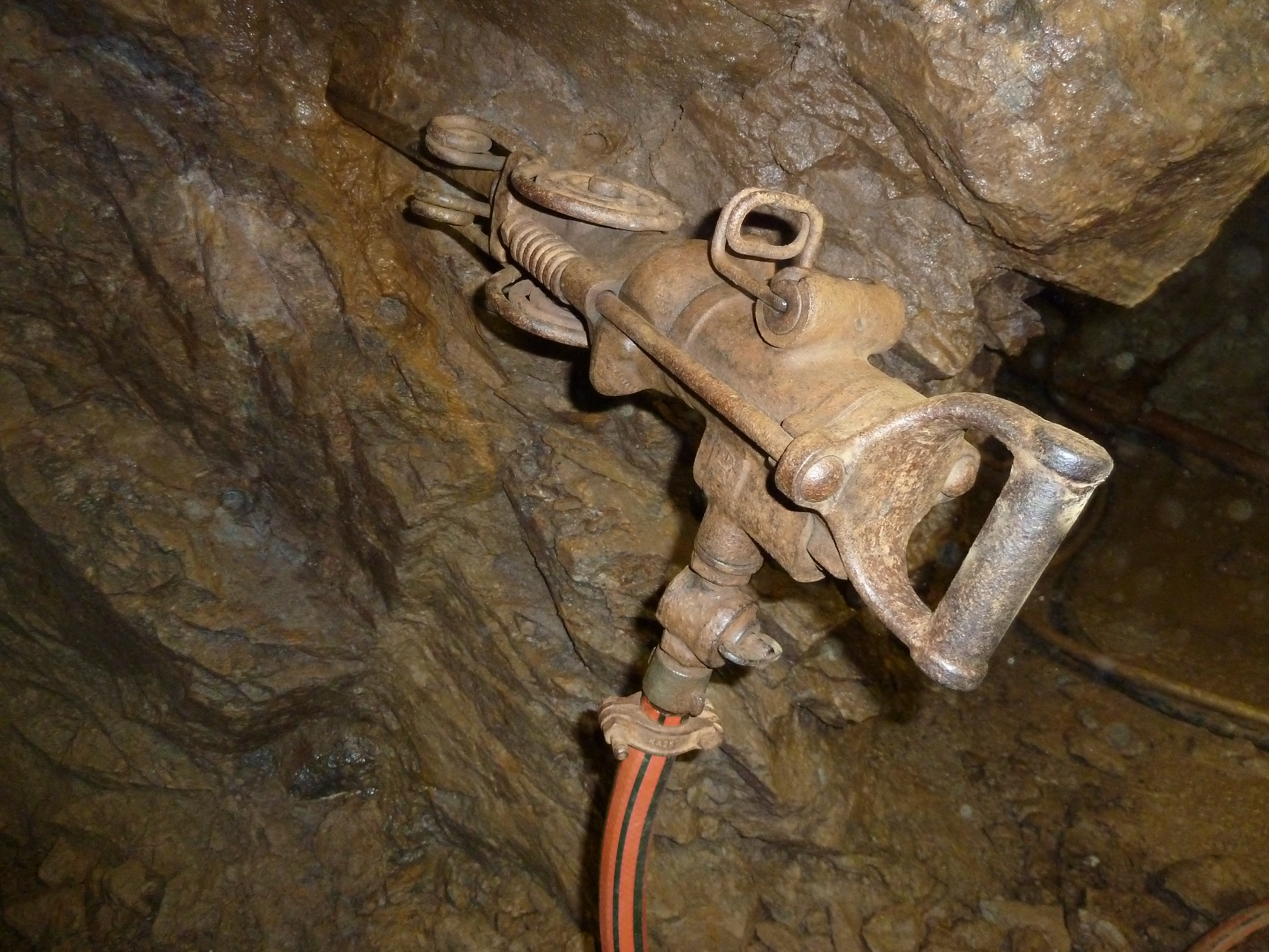 Funktionsfähiger Presslufthammer im Besucherbergwerk auf dem Berg Schauinsland